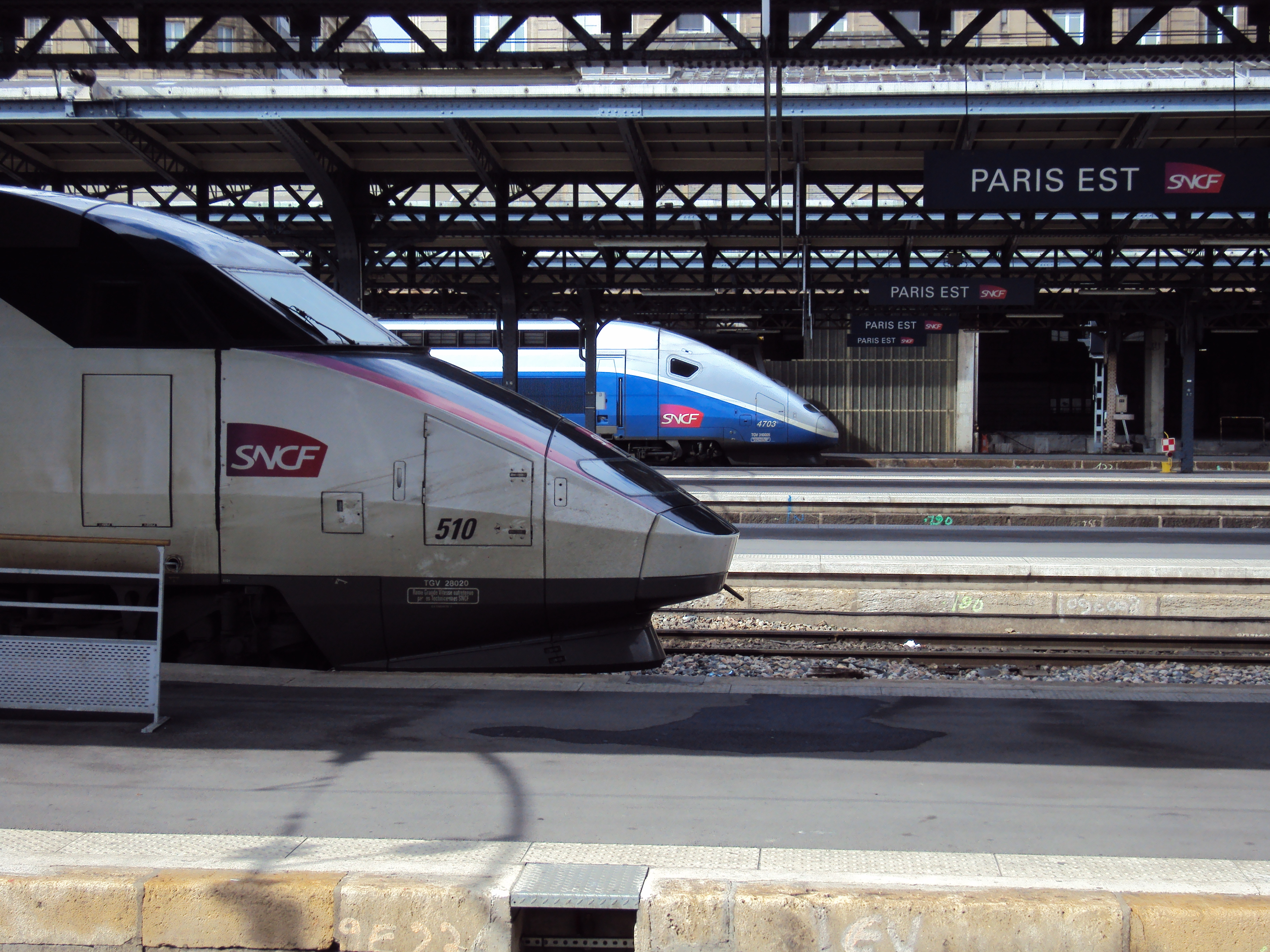 Les nez des rames réseau 510 (en livrée Carmillon) et Euroduplex (2N2) 4703